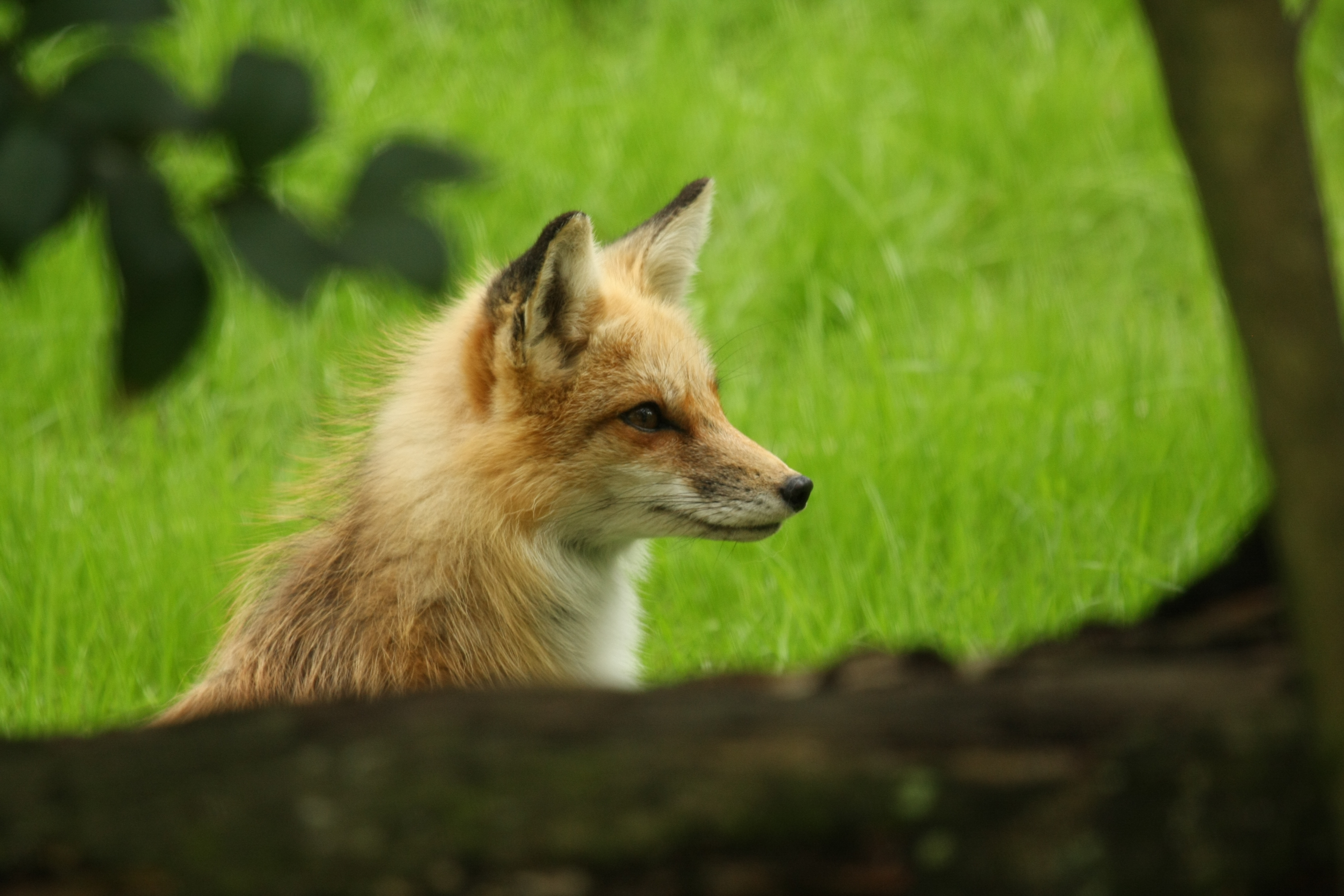 Renard roux vu de profil.